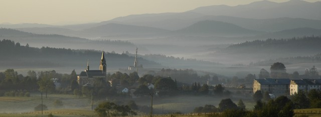 Poland, Lutowiska - village view.